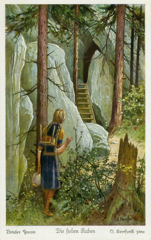 Die sieben Raben. Postkartenserie nach dem Märchen. Serie von sechs Postkarten der Firma Uvachrom. Serie 320, Nr. 4892. Text der Rückseite: Schwesterchen war froh, dass es wusste, wo die Brüder waren. Bald fand es auch den Glasberg. Ein Zwerglein öffnete ihm. Aber die Raben waren ausgeflogen. Schwesterchen aß von jedem Teller ein wenig und trank aus jedem Becherlein ein Schlückchen und ließ sein Ringlein in ein Becherlein fallen.